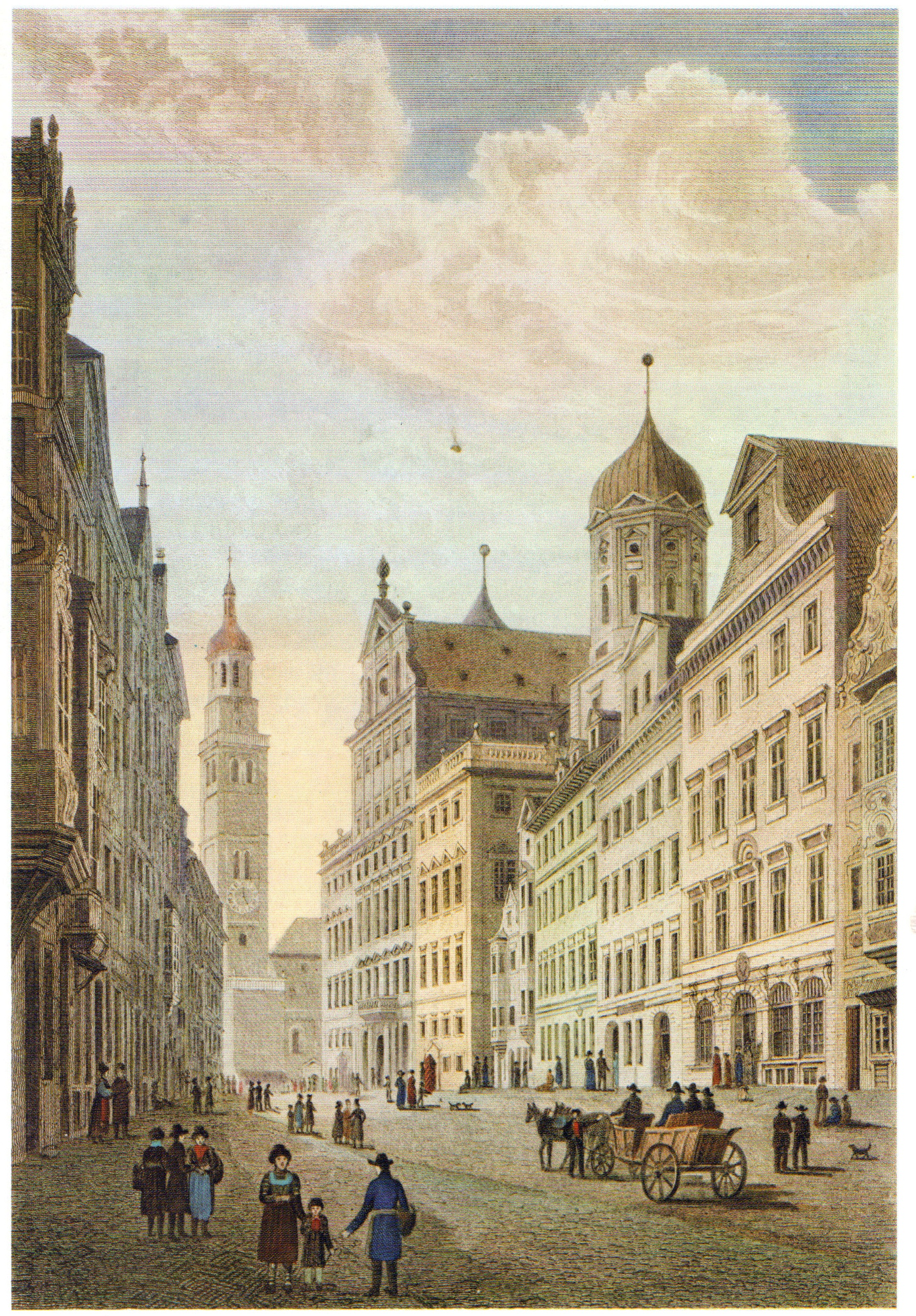 Maximilianstraße mit Rauthaus und Perlach. Kolorierte Radierung, Staats- und Stadtbibliothek Augsburg